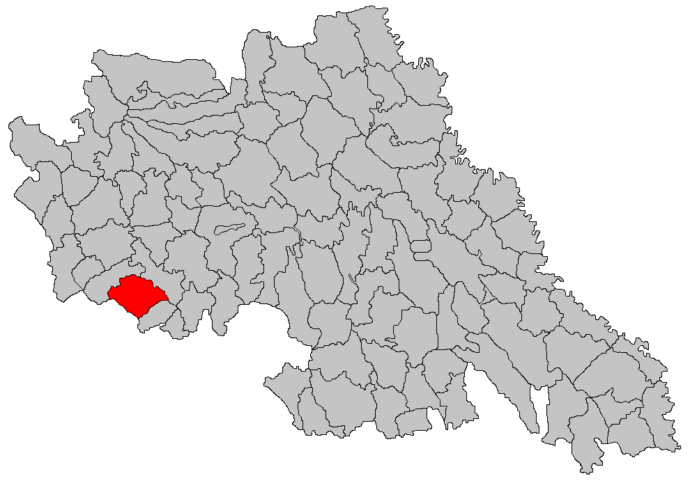 Categorie:Hărţi ale judeţului Iaşi